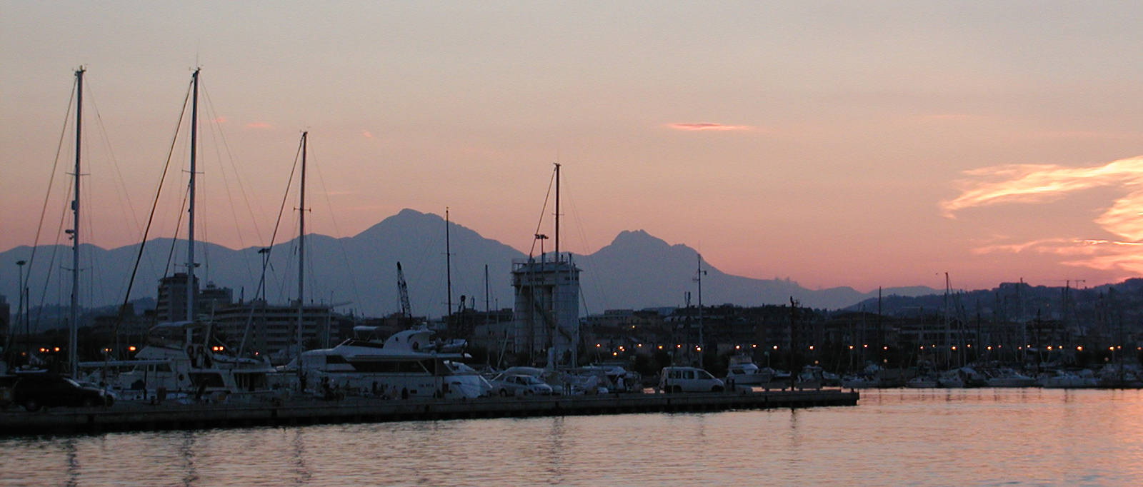 Der neue Jachthafen von Pescara und "die schlafende Schöne" ital."la bella addormentata".